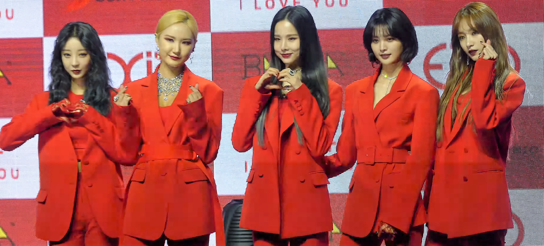 181121 EXID '알러뷰' 싱글 앨범 쇼케이스 포토타임